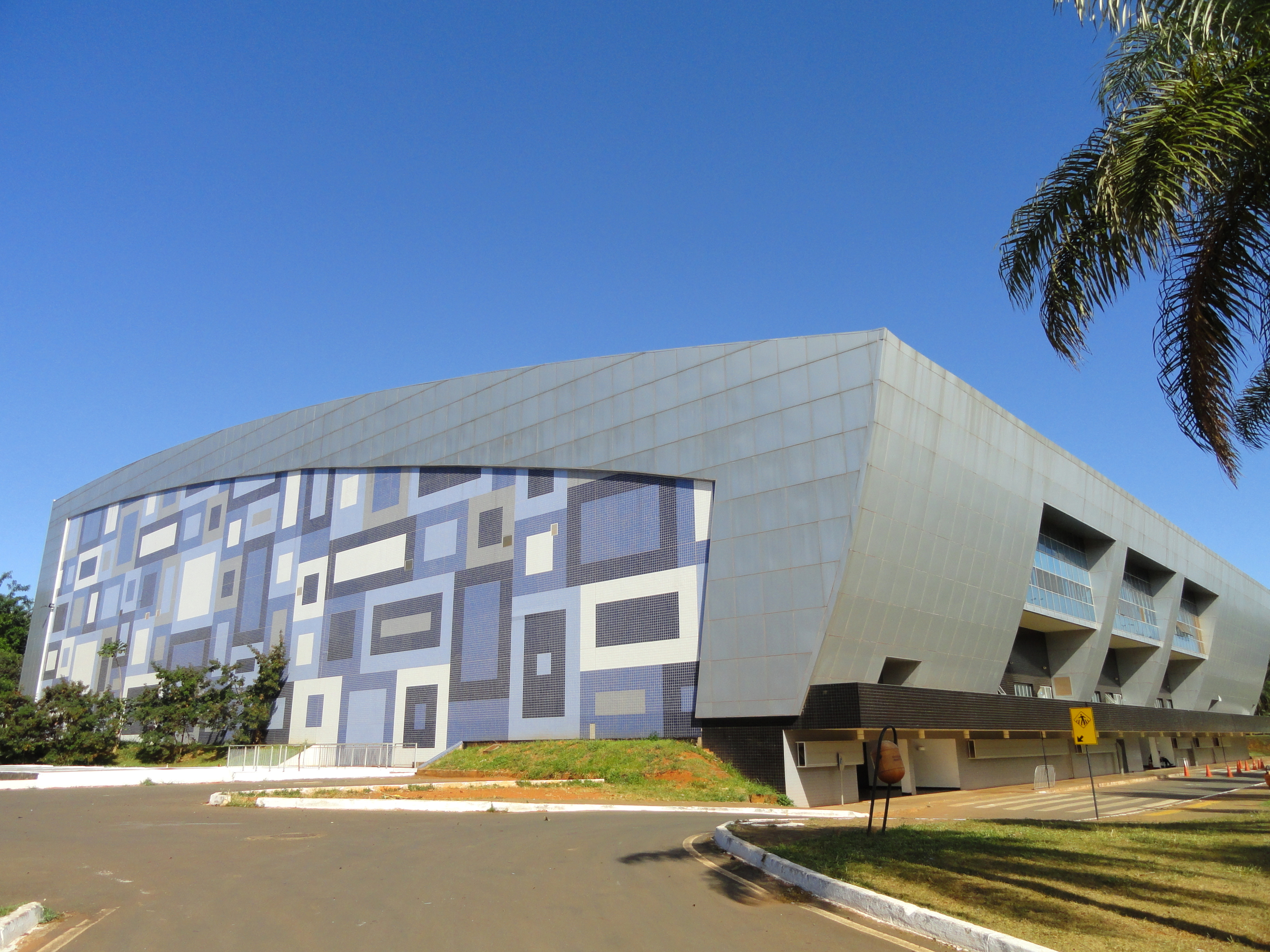 Centro de Convenções Ulysses Guimarães, Brasília, Brazil.